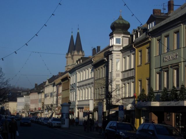 Ludwigstraße in Hof